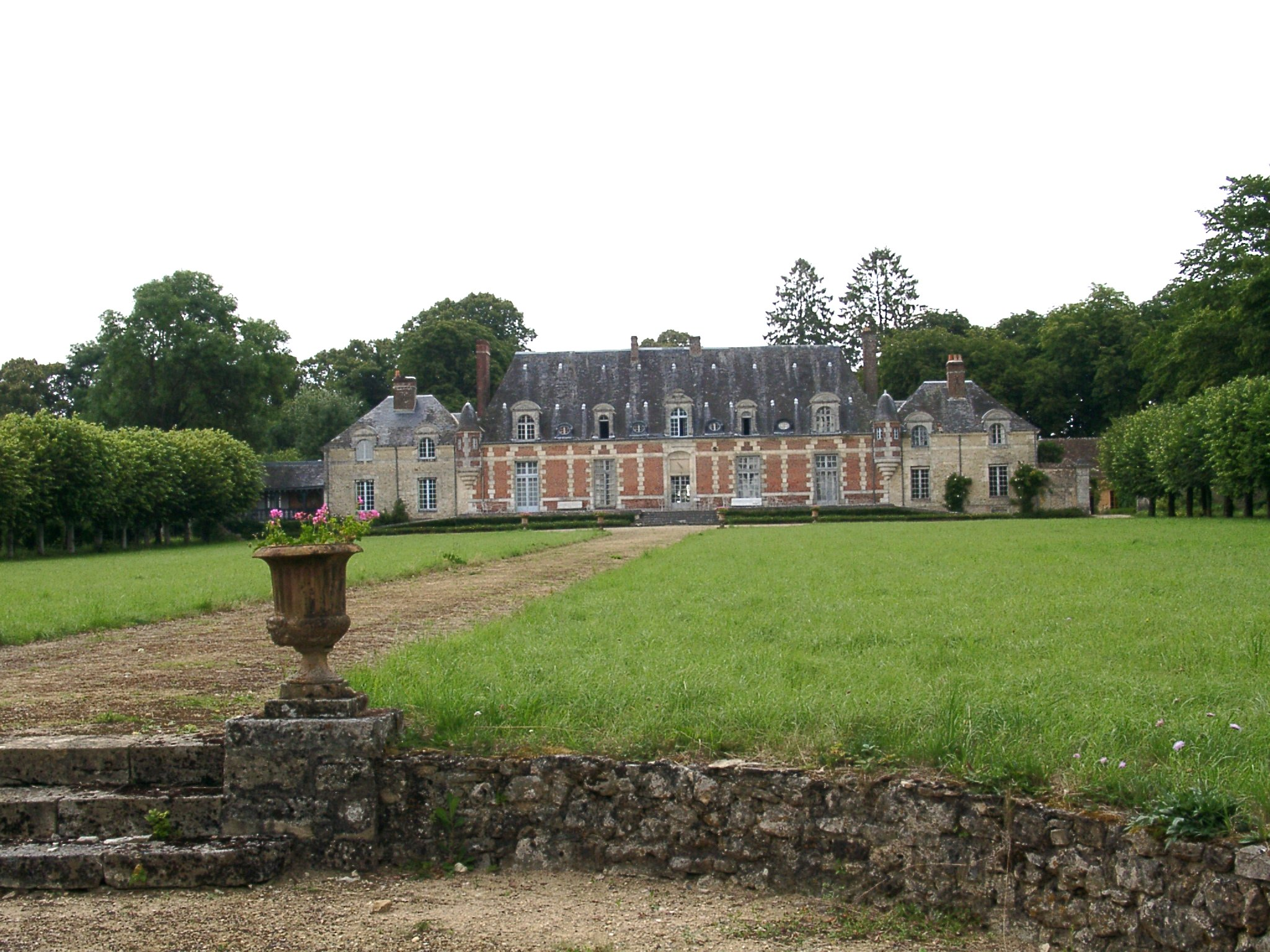 17e s. .